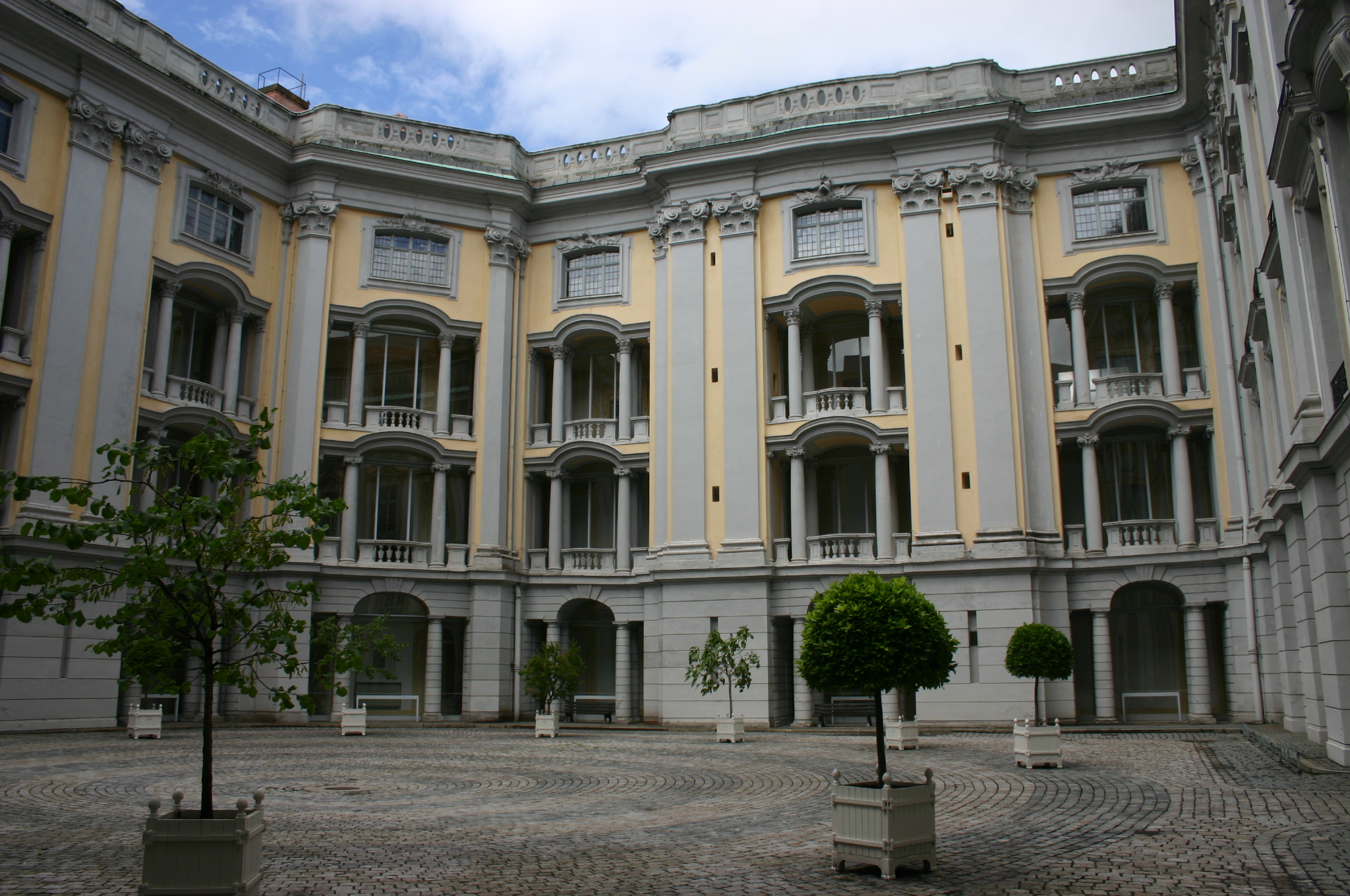 Arkadenhof der Residenz Ansbach